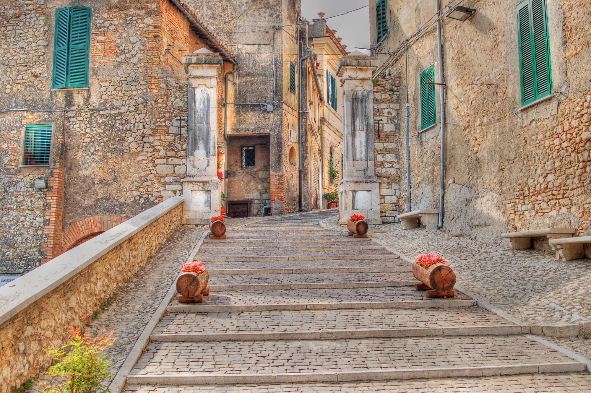 Roccantica (RI), 2006